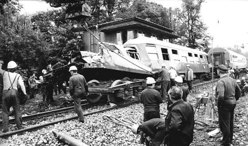 ADN-ZB Ludwig-12.6.1981-hü-Erfurt: Eisenbahnunglück-Eisenbahner des Oberbauwerkes Neudietendorf sind mit leistungsfähiger Technik bei der Räumung der Waggons vom Gleiskörper. (Handschriftlicher Zusatz: Db gesperrt)